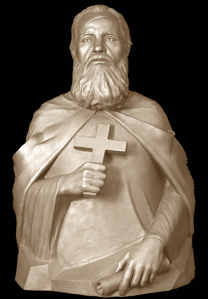 прп. Варлаам, первый игумен Киево-Печерского монастыря (XI век). Скульптурная реконструкция по черепу С.А. Никитина, 1988. Barlaam of Kiev, Forensic facial reconstruction by S.A.Nikitin.